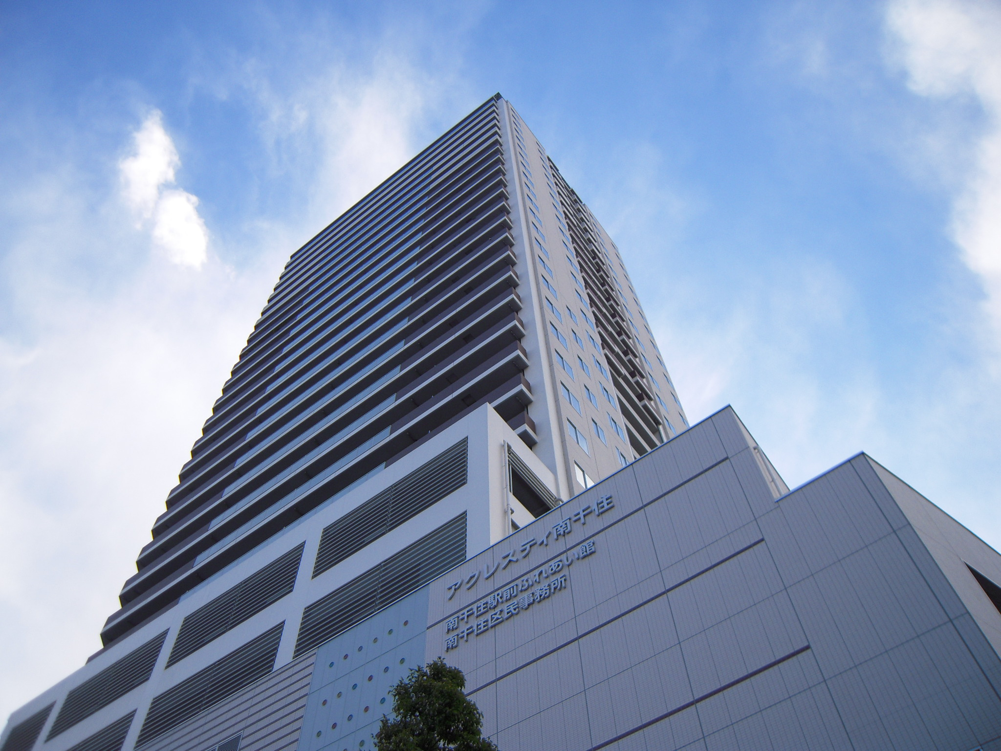 ブランズタワー南千住